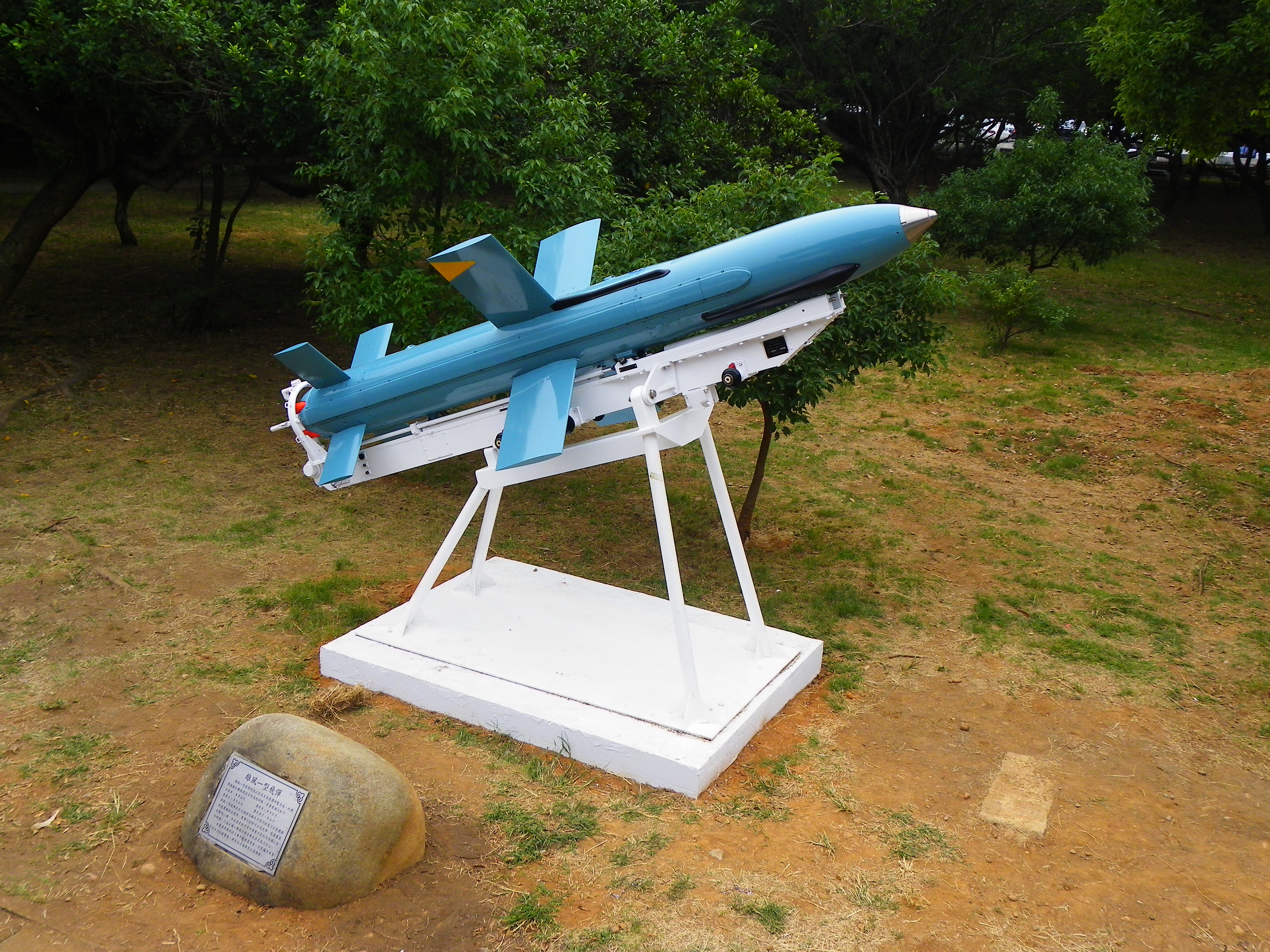 陳列於成功嶺的雄風一型反艦飛彈。